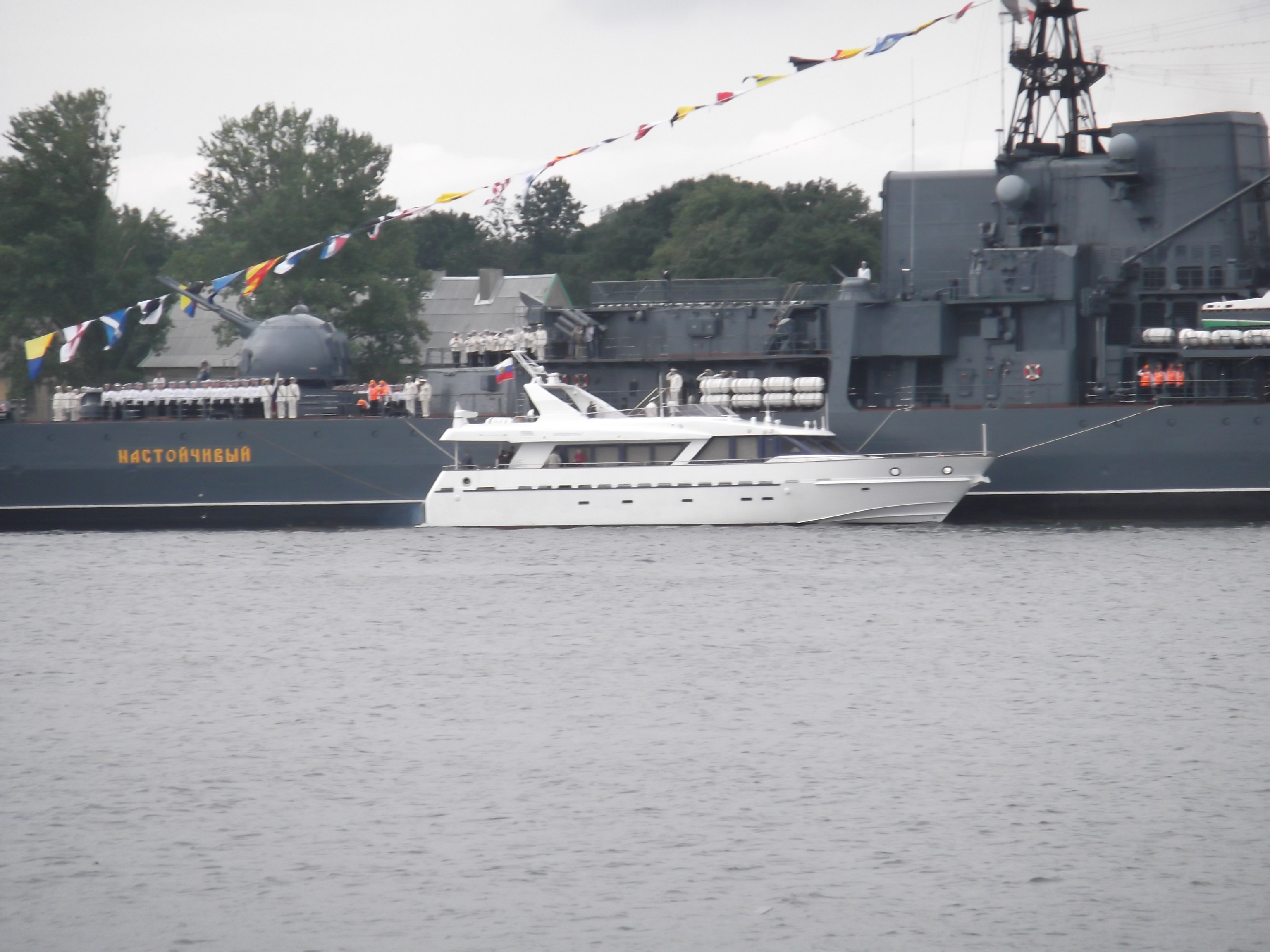 Судно Президента России Дмитрия Медведева перед эсминцем "Настойчивый" на параде в честь Дня ВМФ в Балтийске.